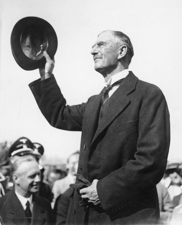 Scherl: Die welthistorische Begegnung der Staatsmänner der vier Grossmächte Europas in München Dem englischen Premierminister Chamberlain wurden während seines Aufenthaltes in München immer wieder begeisterte Kundgebungen dargebracht. Fot. 29.9.38, 12883-38 Information added by Wikimedia users.British Prime Minister Neville Chamberlain arrives at Munich for the Munich Conference, 29 September 1938.